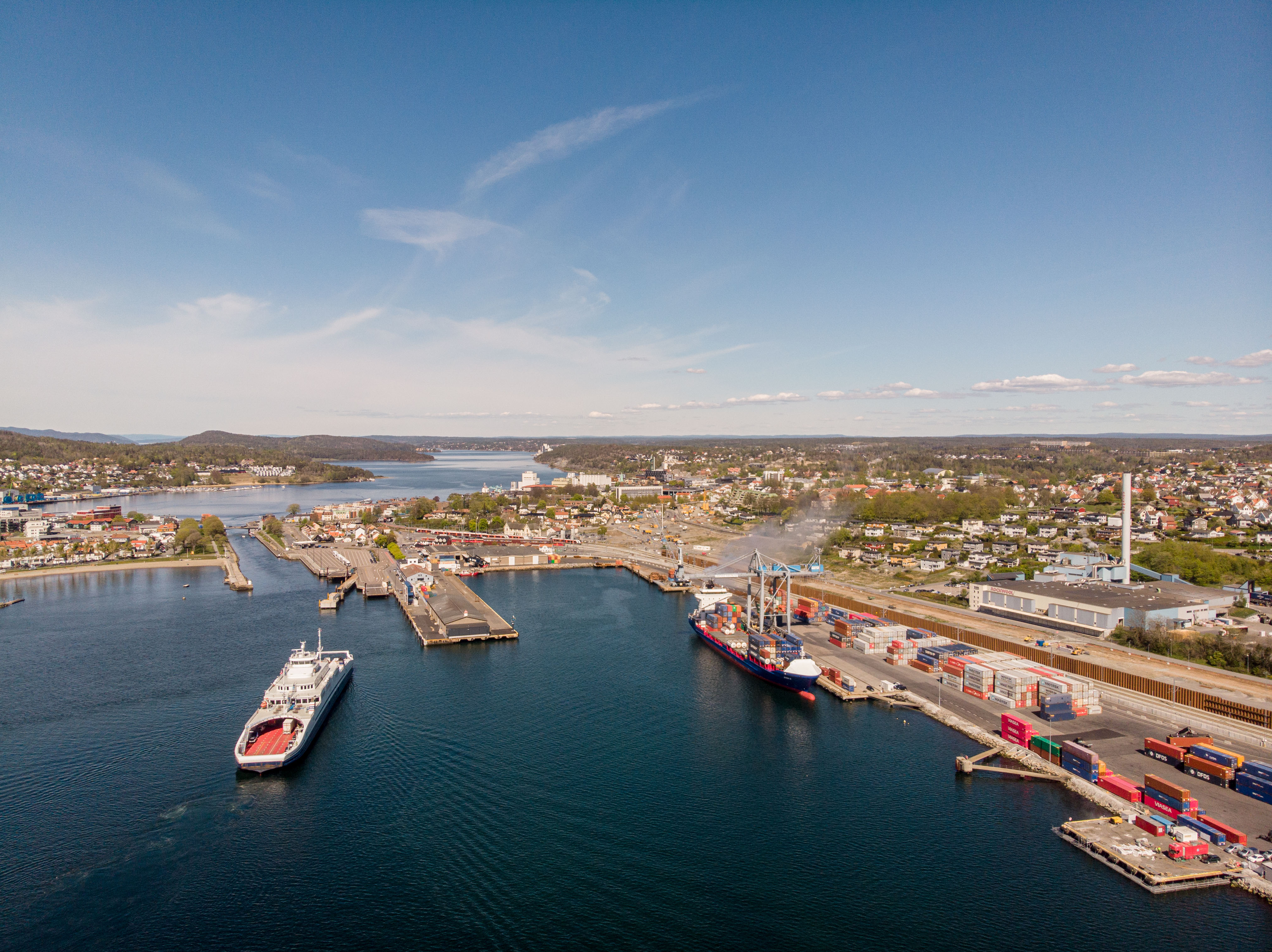 Værlebukta med Værlebrygga og Gernerkaia. Lossing av lasteskipet Sven D. Bastø V på vei inn til kai.